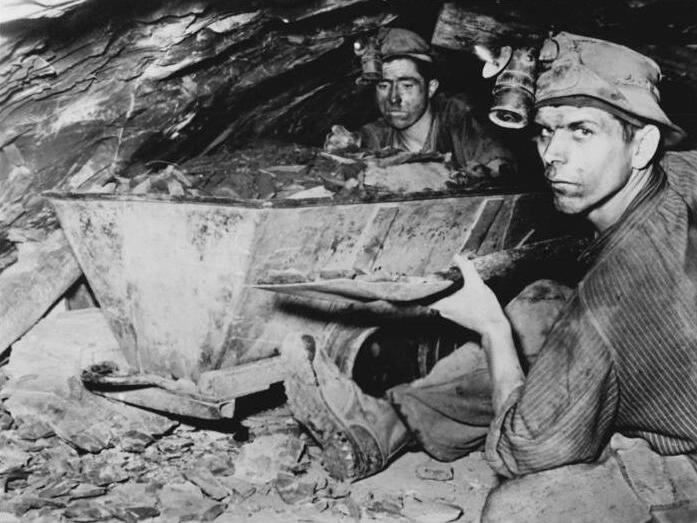 Bergarbeiter, Lore Zentralbild Paalzow 4.1.1952 Die Kumpels vom Mansfeld Kombinat "Wilhelm Pieck".Die Brigade "Ernst Have" vom Fortschrittschacht zeichnet 3% ihres Lohnes für den Aufbau Berlins.Der Häuer Werner Döring füllt einen Hund vor Streb und im Hintergrund der Treckejunge Joachim Strebe.